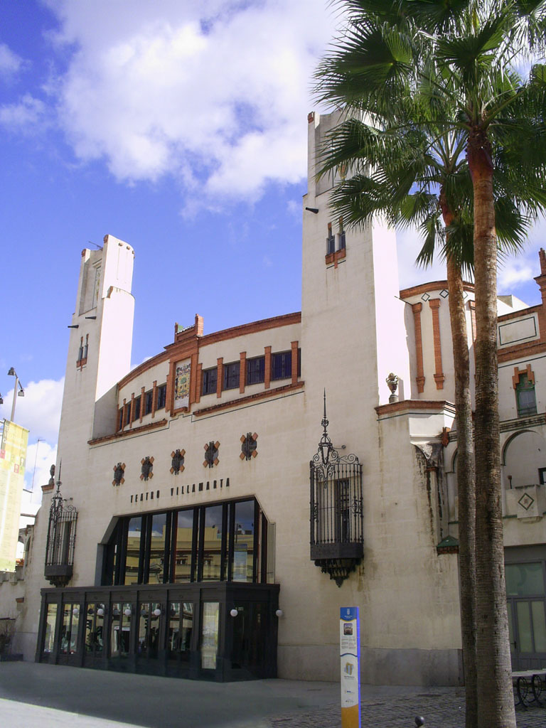 Teatro Villamarta; Villamarta Theatre